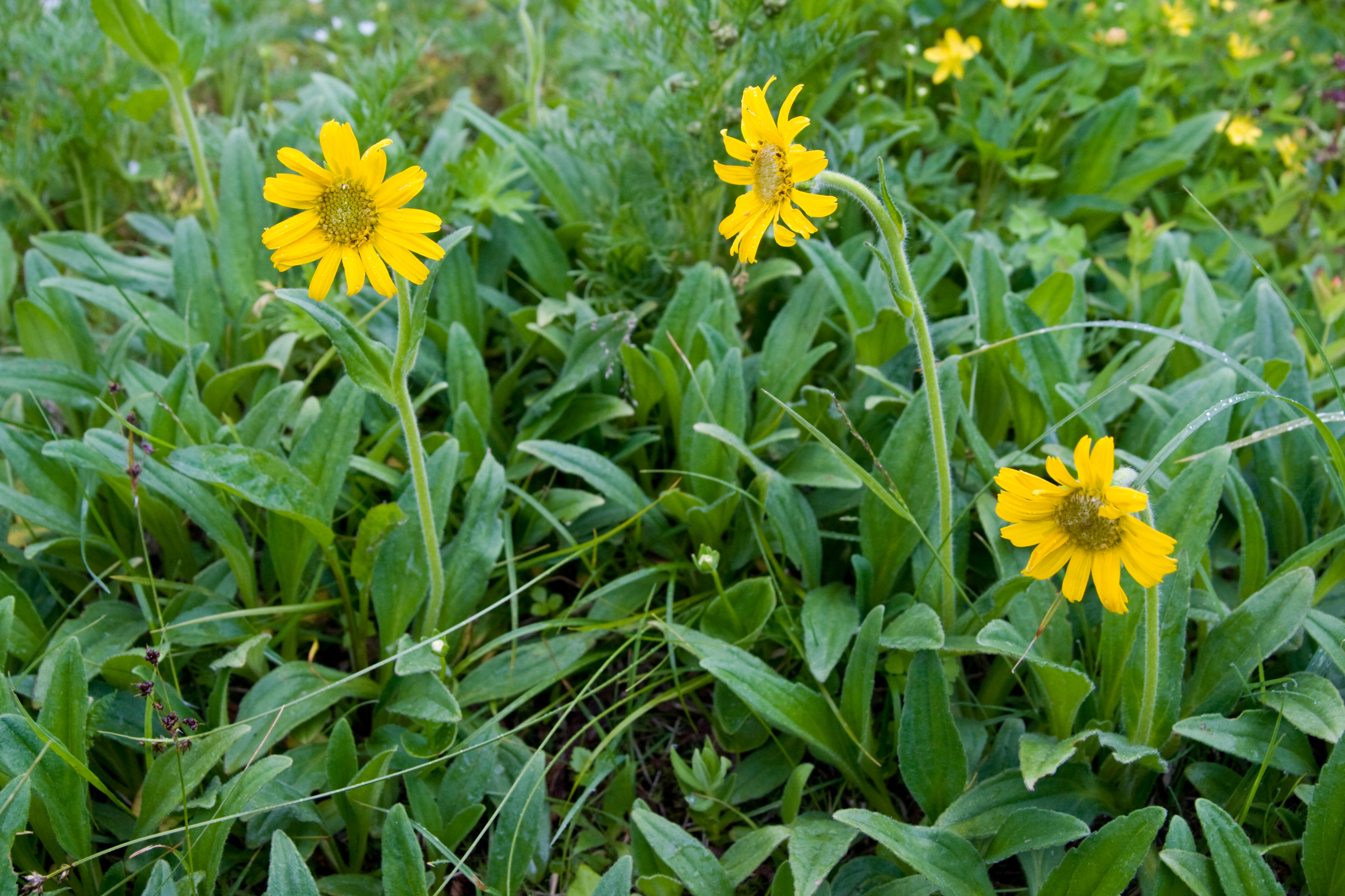 ウサギギク (学名:Arnica unalascensis var. tschonoskyi)